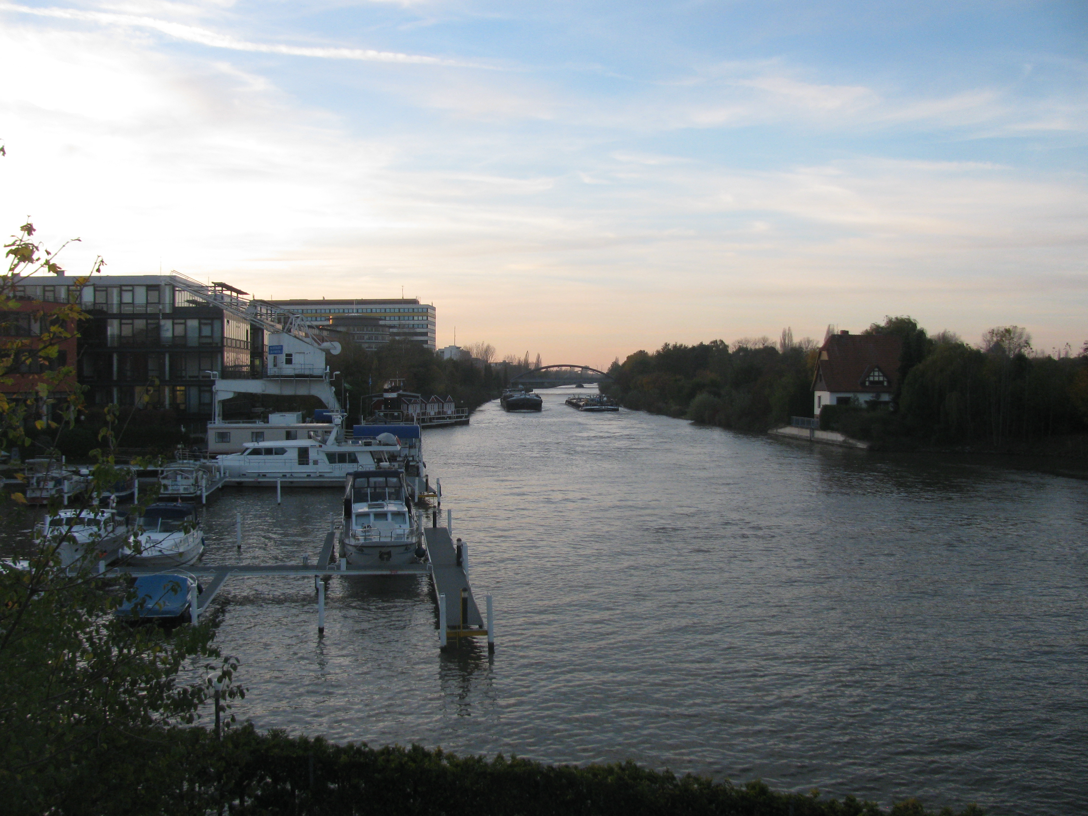 der Mittellandkanal in Hannover westlich der Tannenbergallee, im Hintergrund die Brücke des Großen Kolonnenweg, links der Stadtteil List, rechts der Stadtteil Vahrenheide